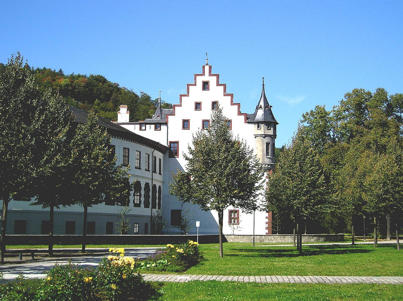 Bibrasbau und Teil des Rundbaus vom Schloss Elisabethenburg in Meiningen